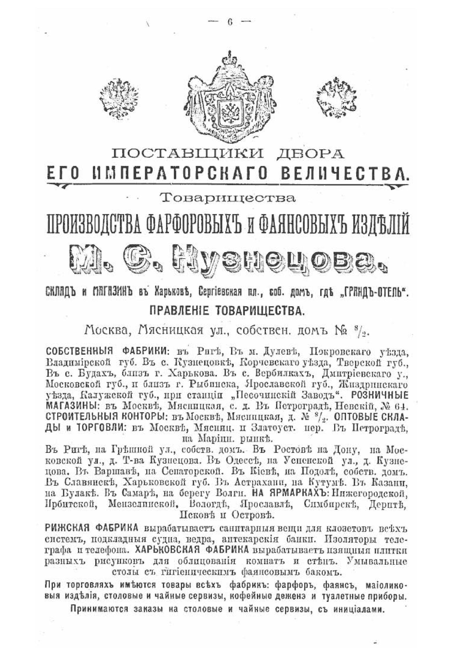 Реклама підприємства Кузнєцова (Будянський завод) у Будах, Харківська губернія.